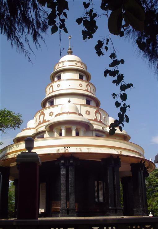 Sir Narayana Guru pilgrim at Sivagiri. It has been taken from website